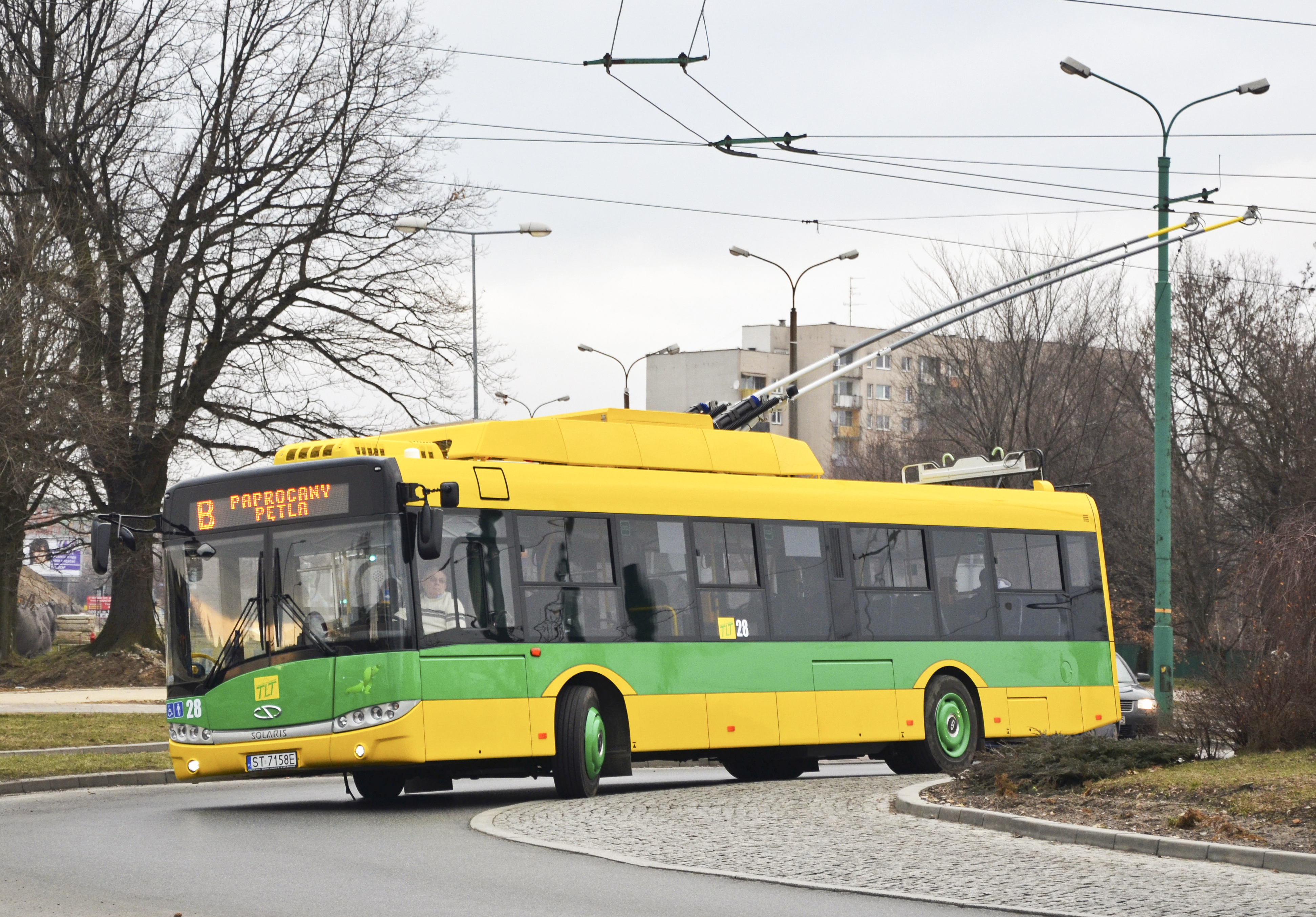 Trolejbus Trollino 12 podczas obsługi linii B w Tychach